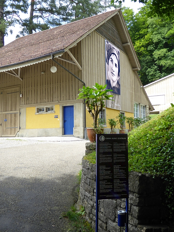 Emma Kunz Zentrum, Würenlos